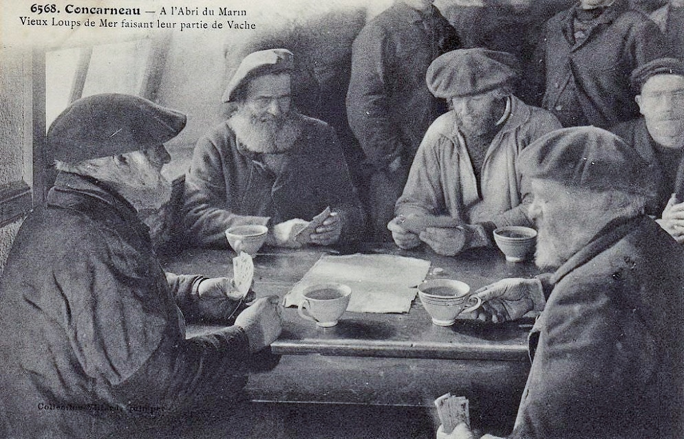 Concarneau : A l'abri du marin. Vieux loups de mer faisant leur partie de Vache (jeu de cartes dénommé aussi aluette).